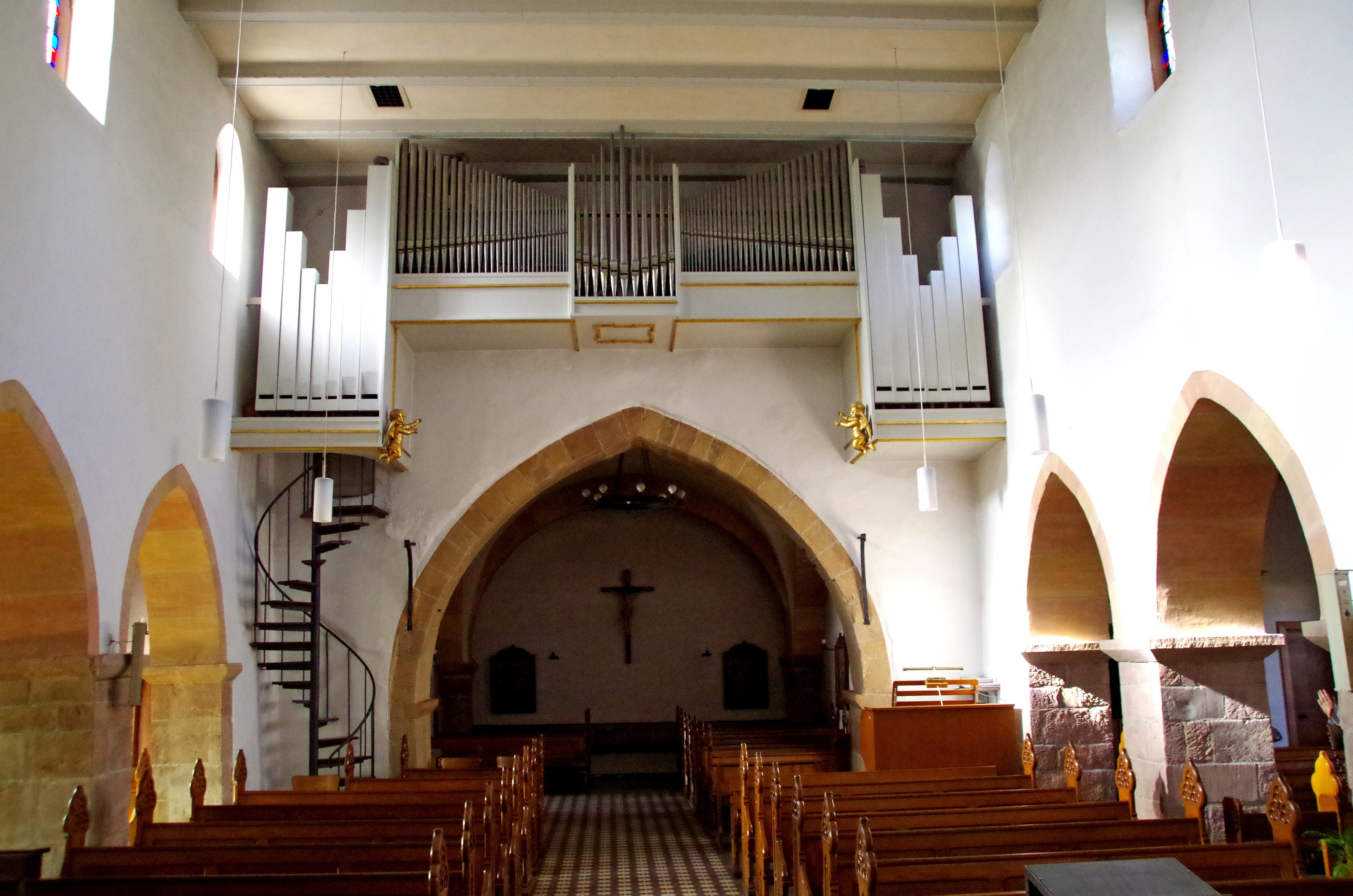 St. Dionysius (Vlatten), Orgel und Westchor